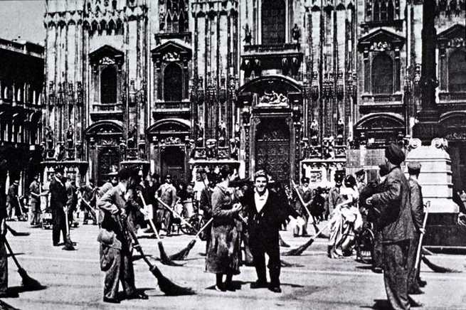 Una scena del film Miracolo a Milano di Vittorio De Sica (1951)